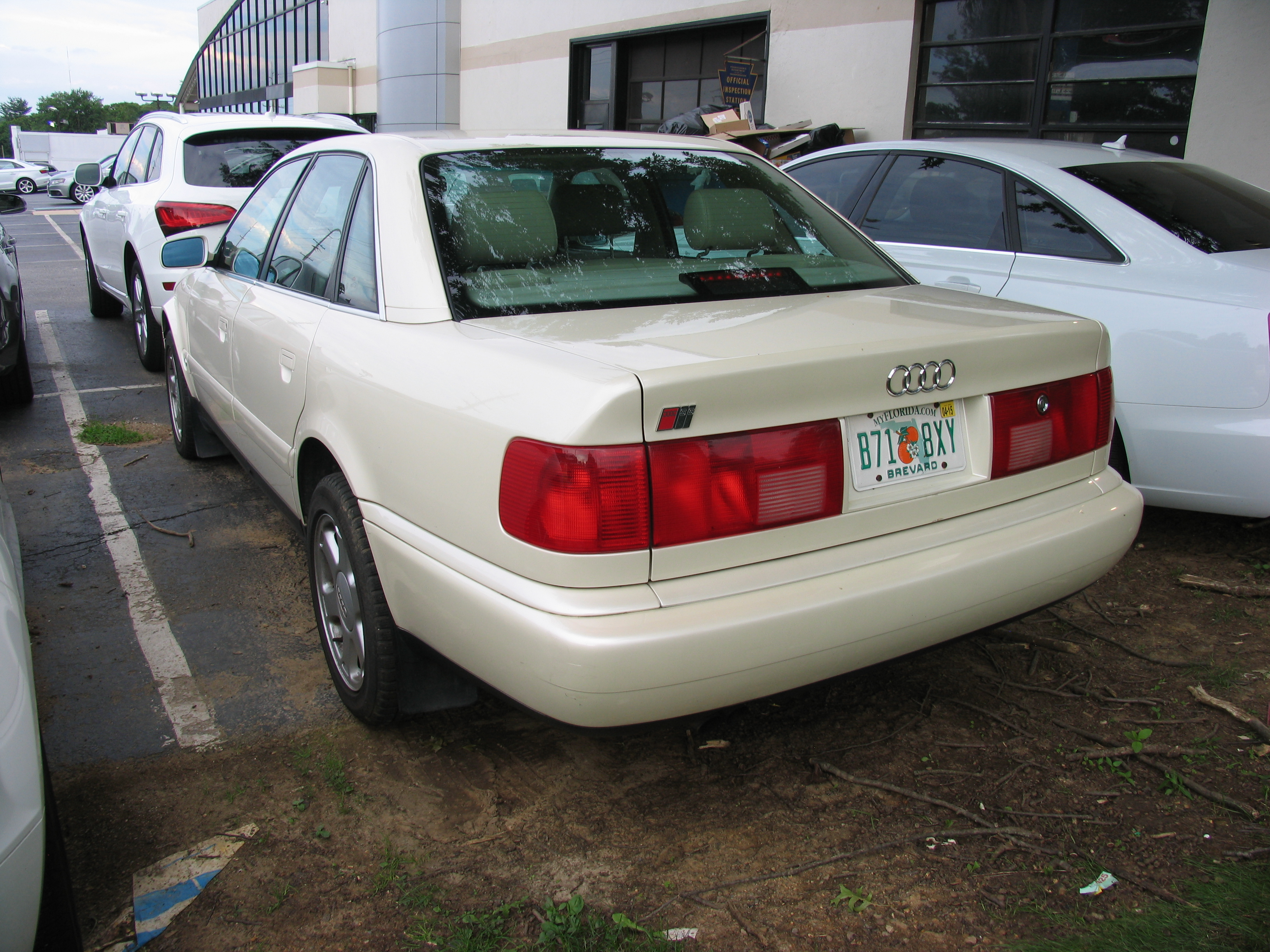 Audi S6